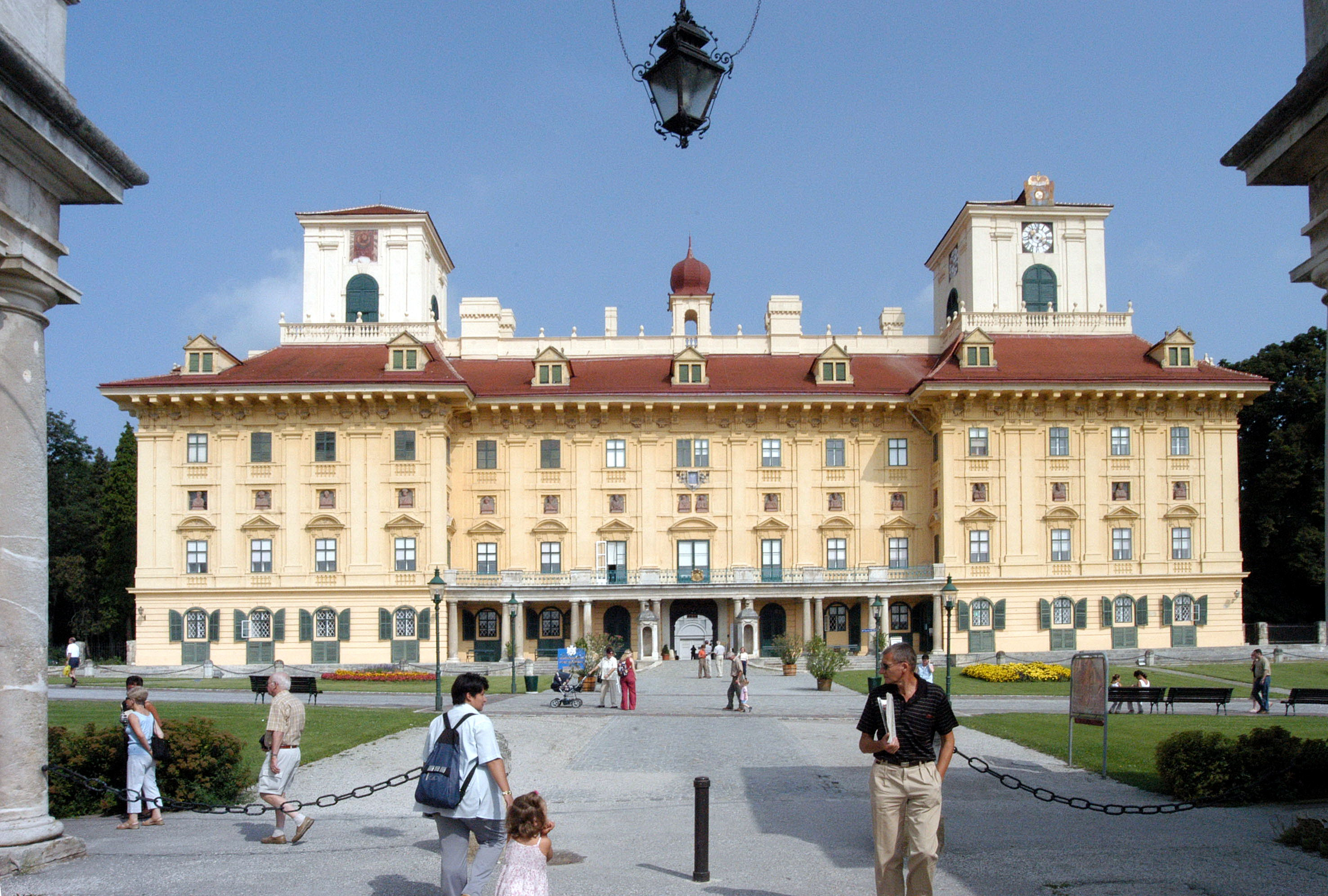 Palace Esterházy in Eisenstadt, Burgenland, Austria